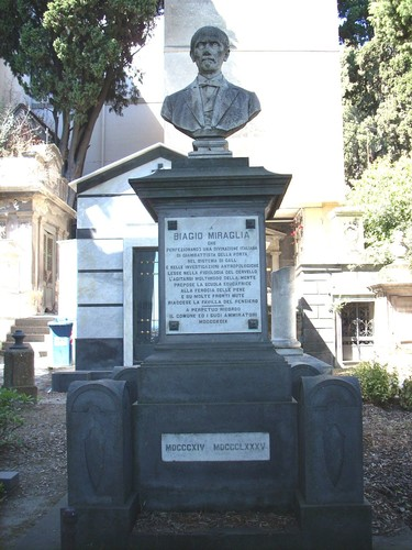 Monumento nel cimitero di Poggioreale eretto in onore di Biagio Gioacchino Miraglia